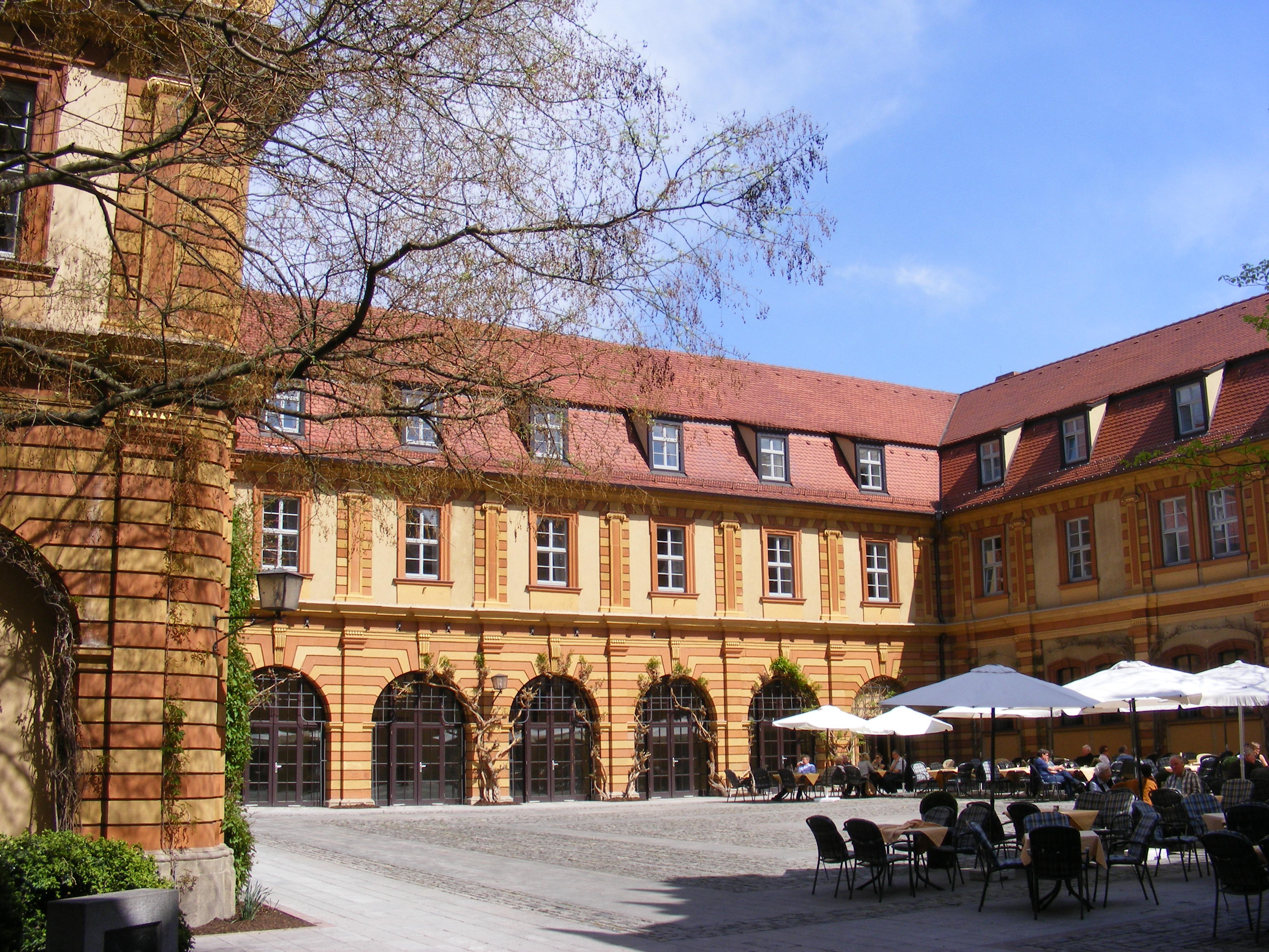 Würzburg - Bürgerspital zum Heiligen Geist (Wirtsgarten).